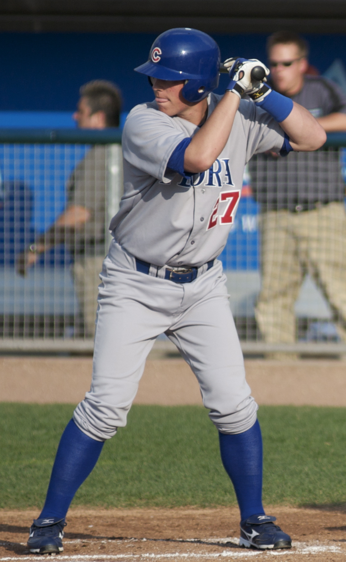 Blake Lalli